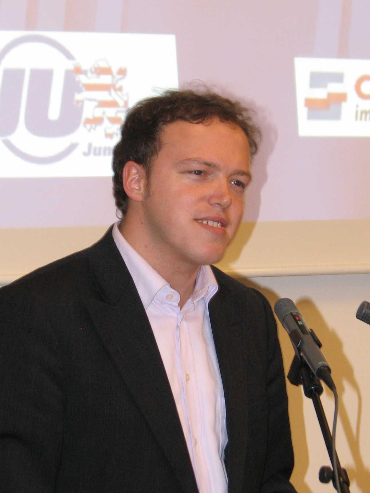 Mario Voigt